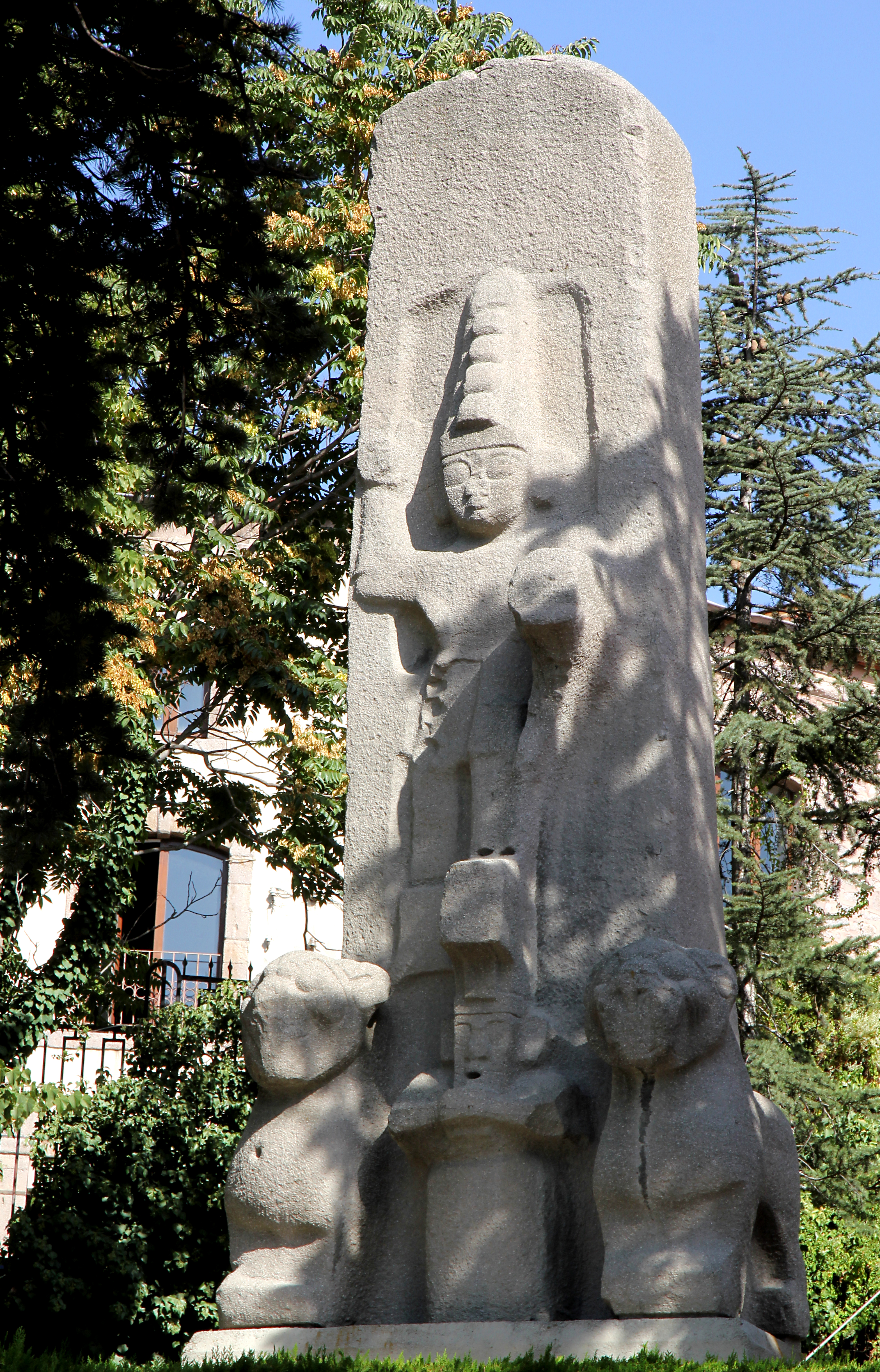 Kopie des hethitischen Reliefs von Fasillar im Museum für anatolische Zivilisationen in Ankara, Türkei